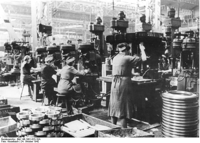 Arbeit der Heimat für die Front: Pausenlos entstehen Panzer auf Panzer Frauenarbeit an Bohrmaschinen 24. Okt. 1942 PK Kisselbach 6399 b. E.M.